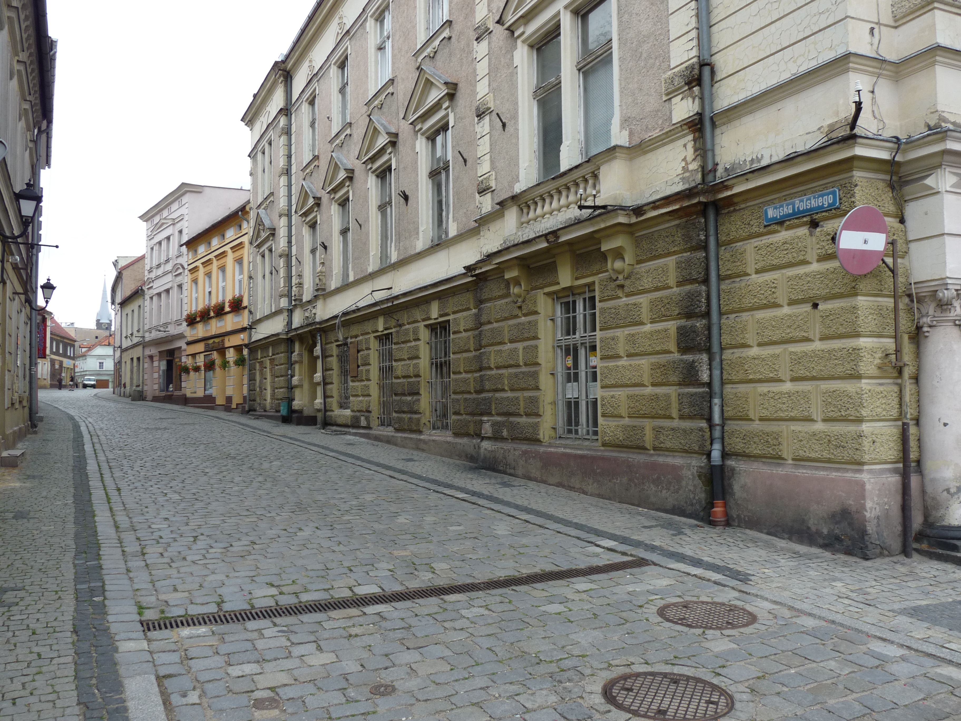 Złoty Stok. Widok ulicy Wojska Polskiego od Rynku